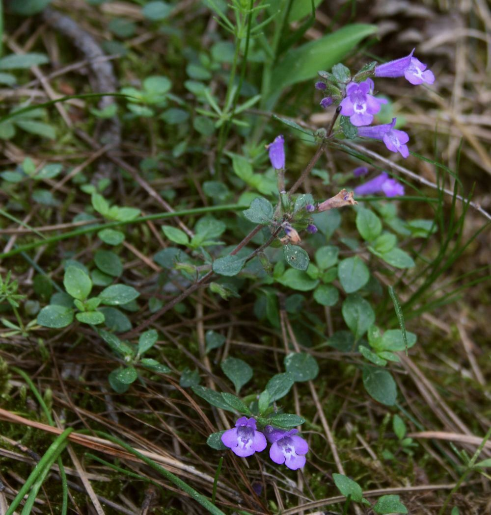 Alpen-Steinquendel (Clinopodium alpinum, Syn. Acinos alpinus), Lippenblütler (Lamiaceae) - Österreich/Austria/Autriche: Niederösterreich, Alpenostrand, N Baden bei Wien